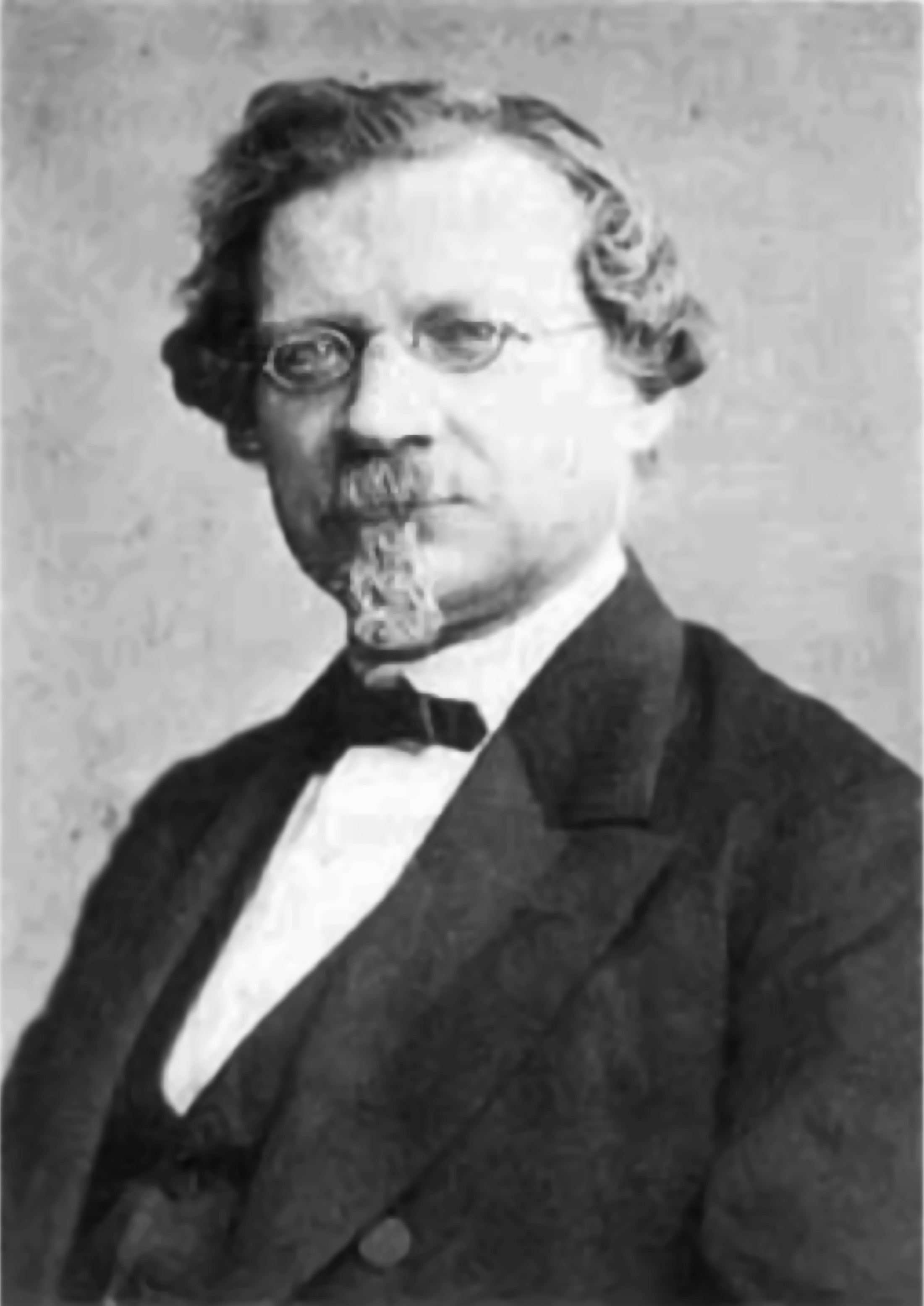 August Wilhelm (von) Hofmann (* 8. April 1818 in Gießen; † 5. Mai 1892 in Berlin)